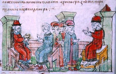 Совет кн. Владимира с Добрыней. Заключение Владимиром мира с волжскими булгарами в 985 (или 986) г. Миниатюра из Радзивиловской летописи. Кон. XV в.